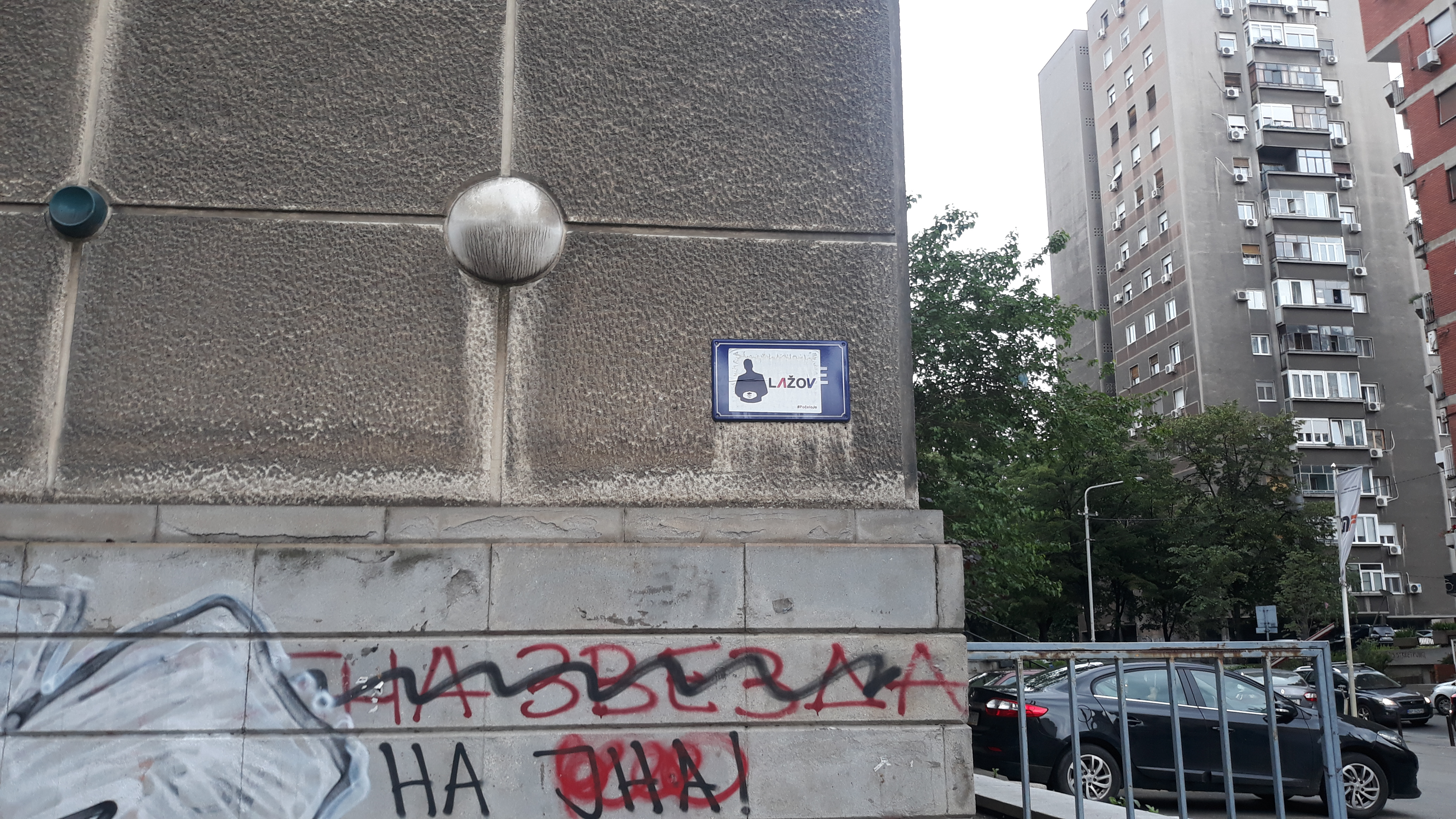 Табла у Улици Краљице Марије у Београду прелепљена протестним плакатом